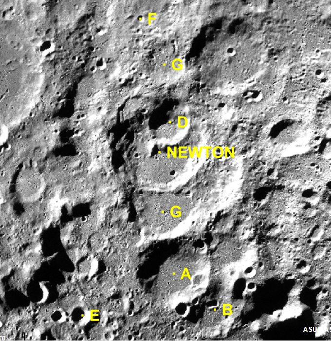 Cráter lunar Newton. Cráteres satélite. (Imagen LROC)